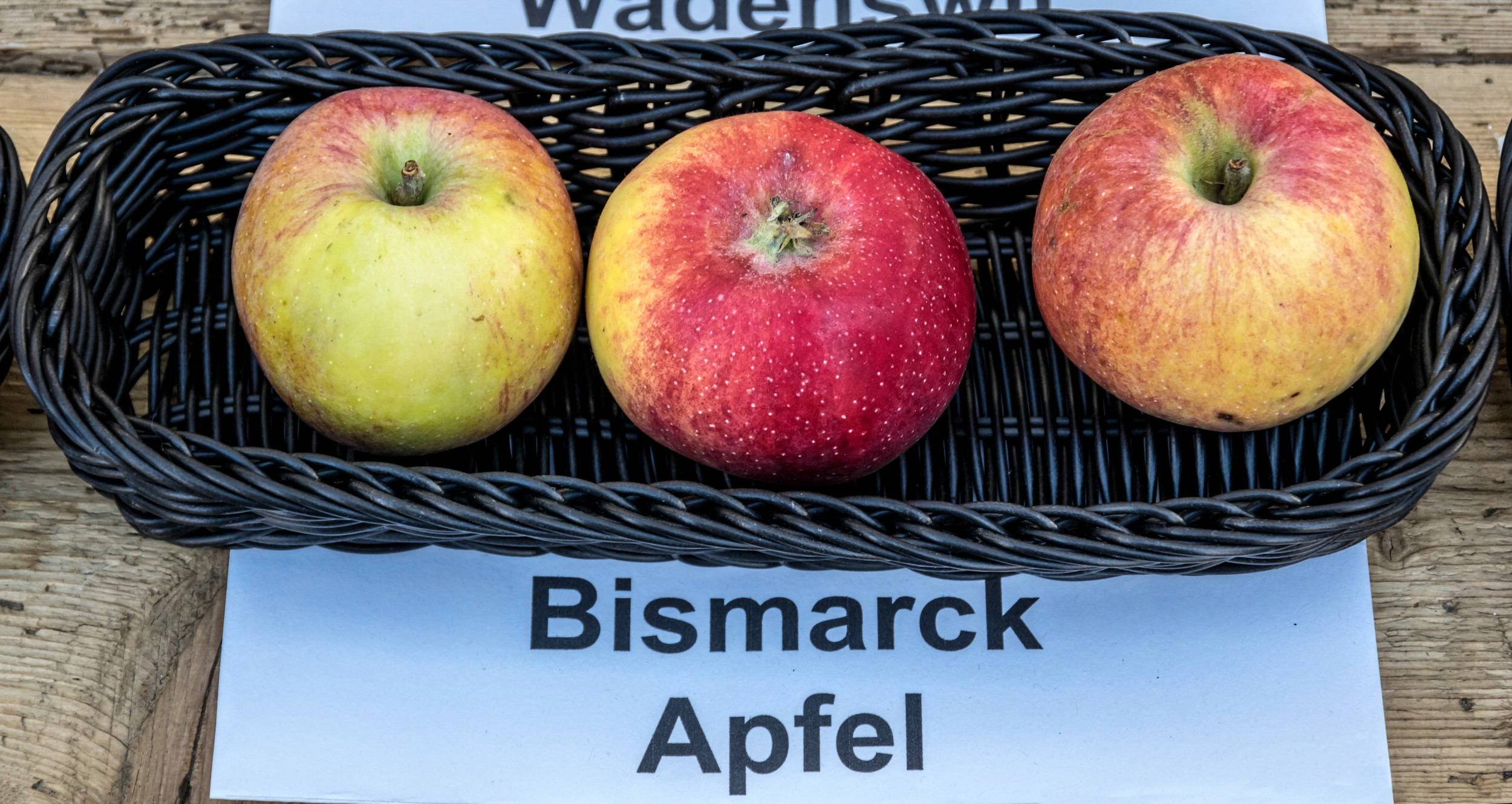 Alte Apfelsorten, von denen es im Badischen noch tragende Bäume gibt. Alle Aufnahmen au dem Oktober 2015